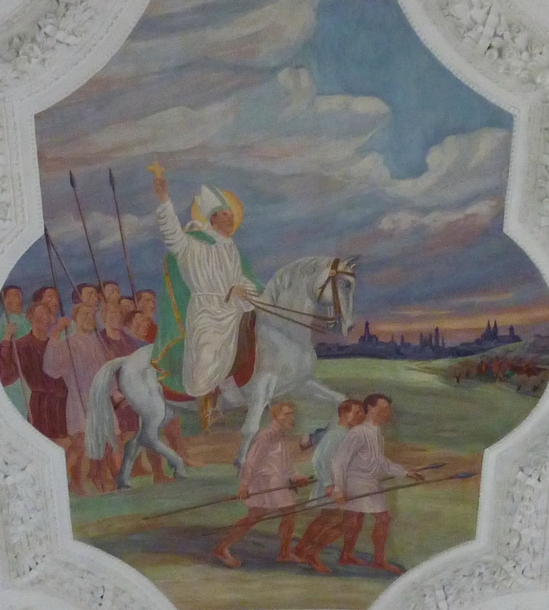 Katholische Pfarrkirche St. Martin in Wertingen im Landkreis Dillingen an der Donau (Bayern), Deckengemälde des Langhauses von Franz Klemmer (1879-1964), Darstellung: der hl. Ulrich in der Schlacht auf dem Lechfeld, im Hintergrund die Stadt Augsburg